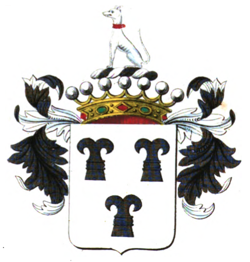 Armoiries de la famille van Bemmel